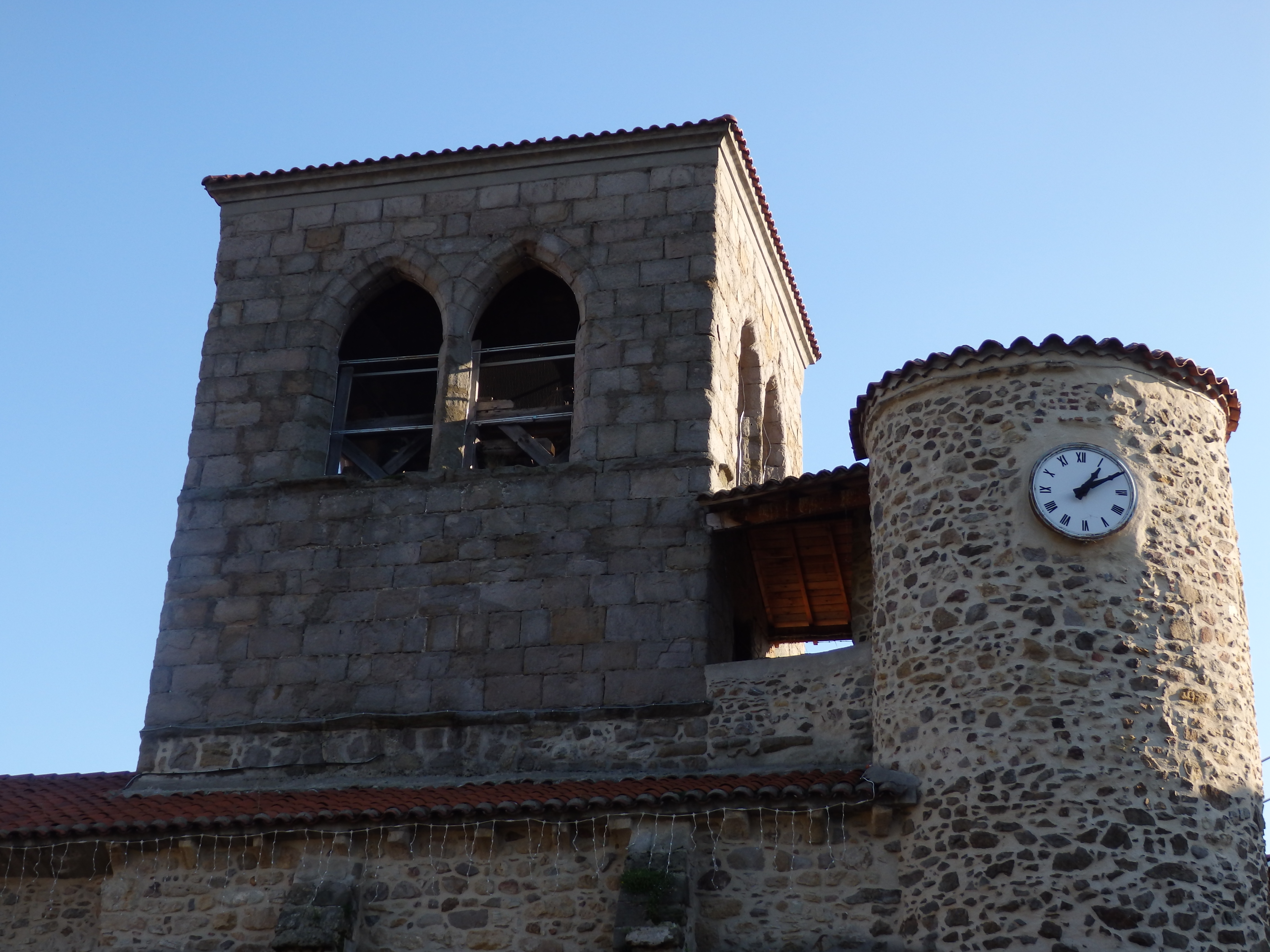 Église Saint-Géraud d'Auzat-la-Combelle .